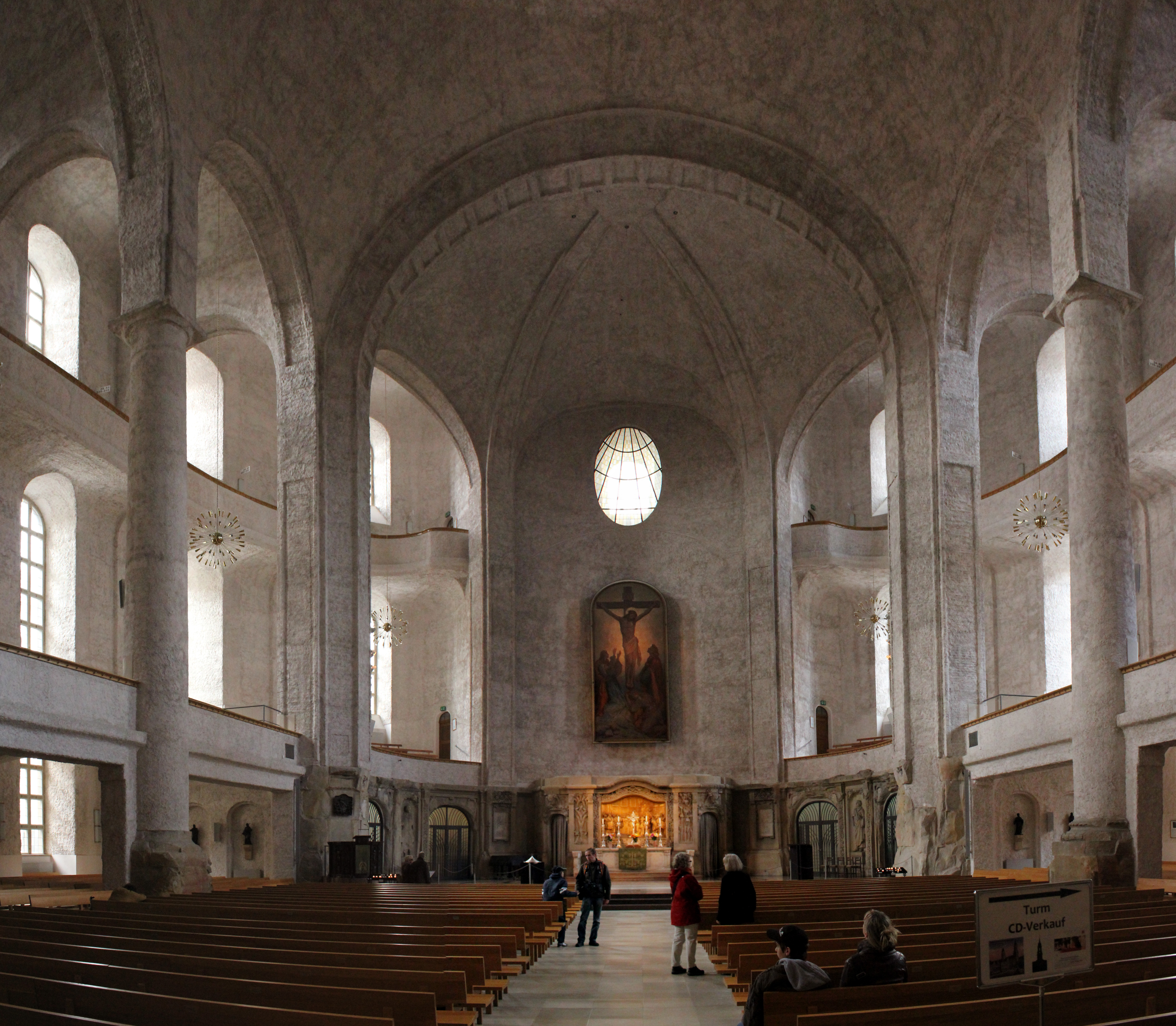 Kreuzkirche Dresden von Innen